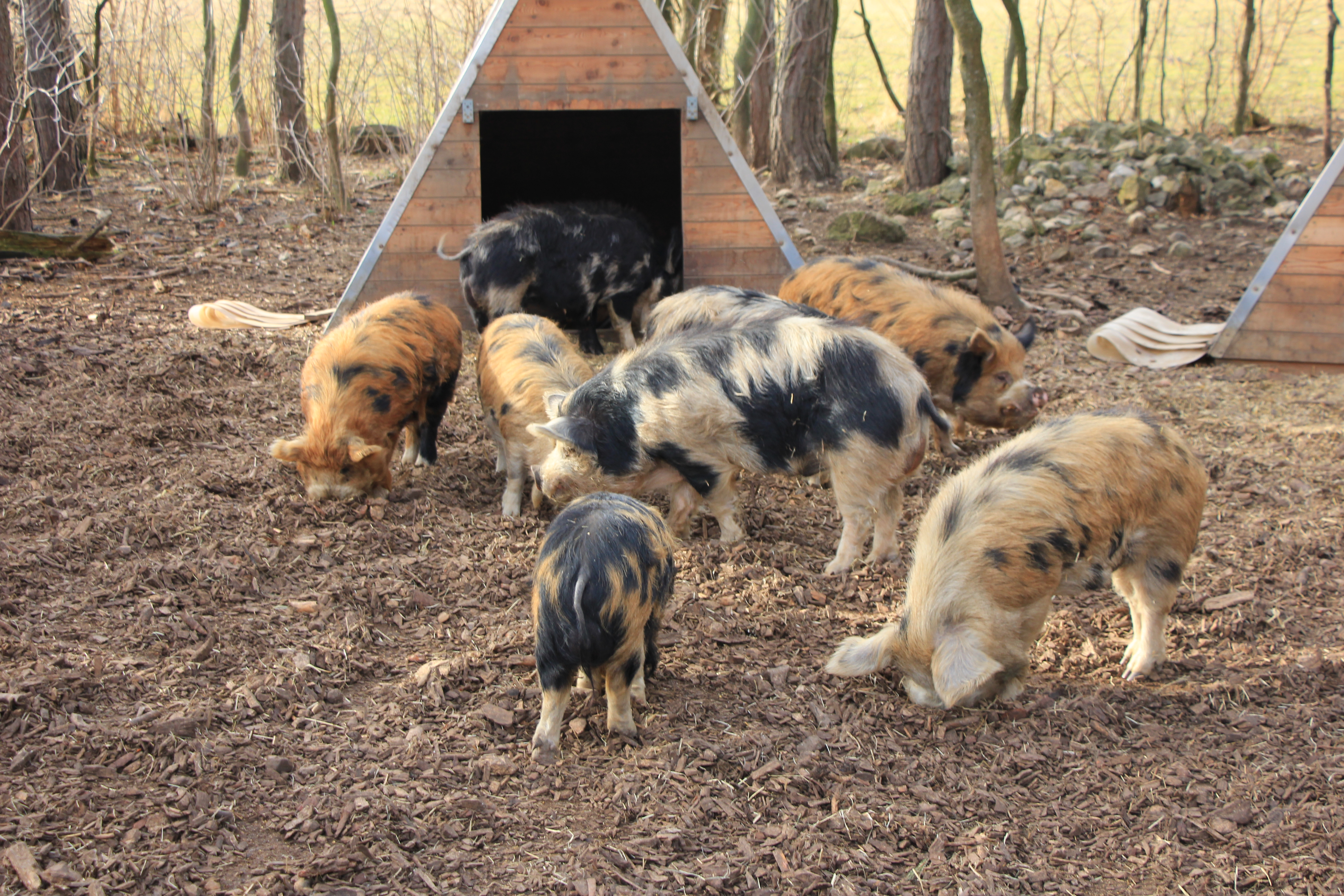 KunekuneSchweine in der Forschungsstation der vetereinärmedizinischen Universität Wien im Haidlhof